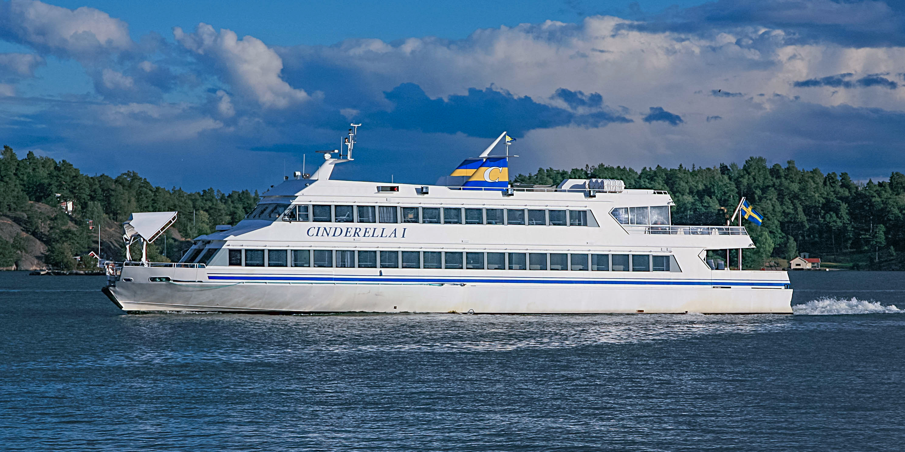 Cinderella I